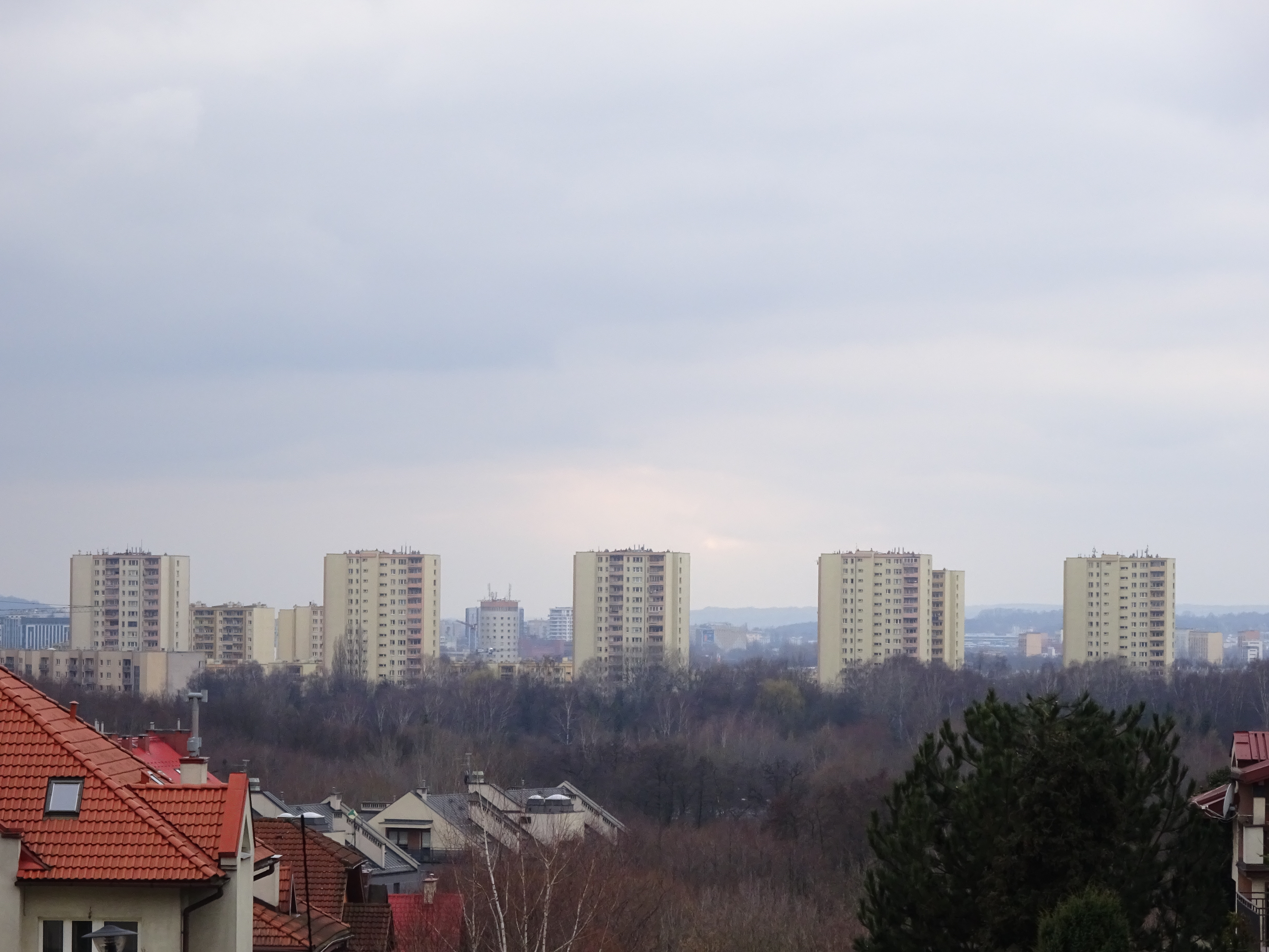 Widok na Prądnik Czerwony z Mistrzejowickiego Os. Złotego Wieku. Kraków.